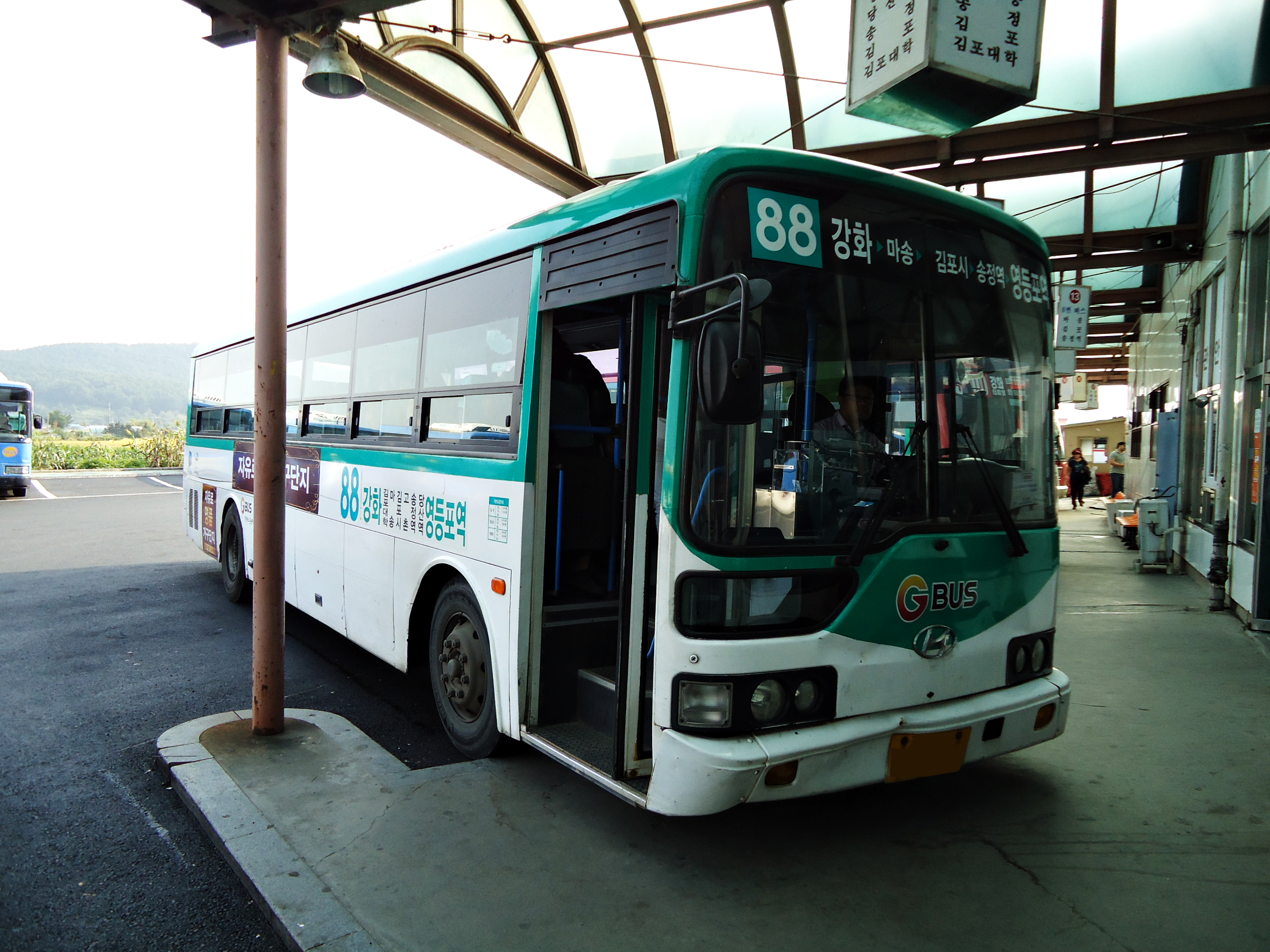 강화운수 88번 뉴 슈퍼 에어로시티 전비형. 시외형 옵션으로 출고해서 내부에 선반, 리클라이닝이 가능한 시트가 적용되었습니다.